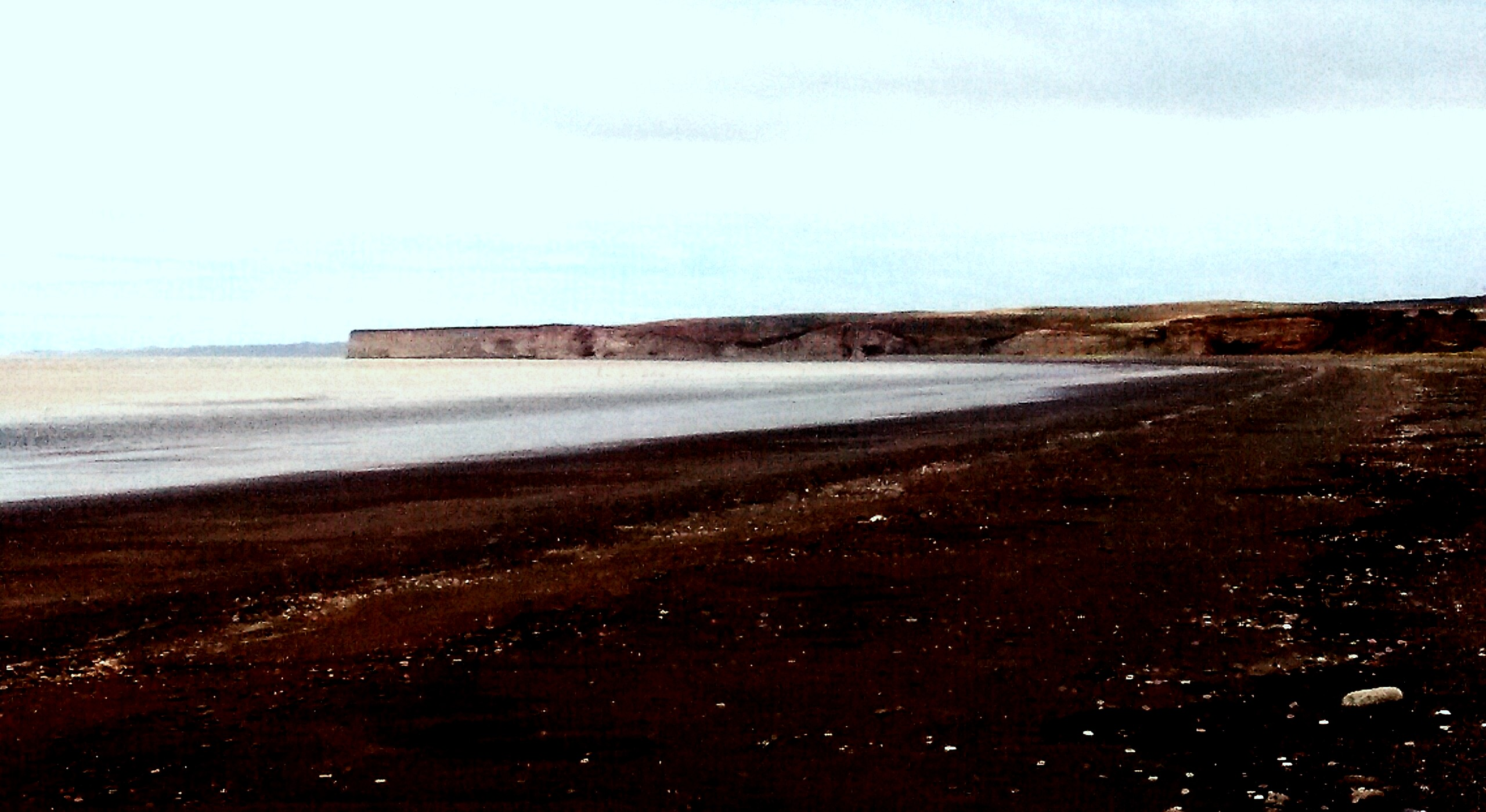 Cabo San Sebastián desde la bahía homónima